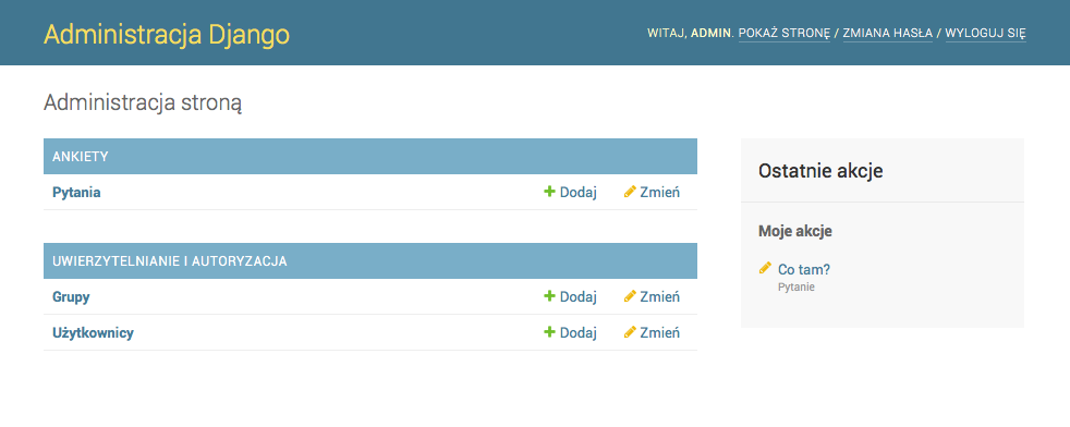 Example Django Admin Panel